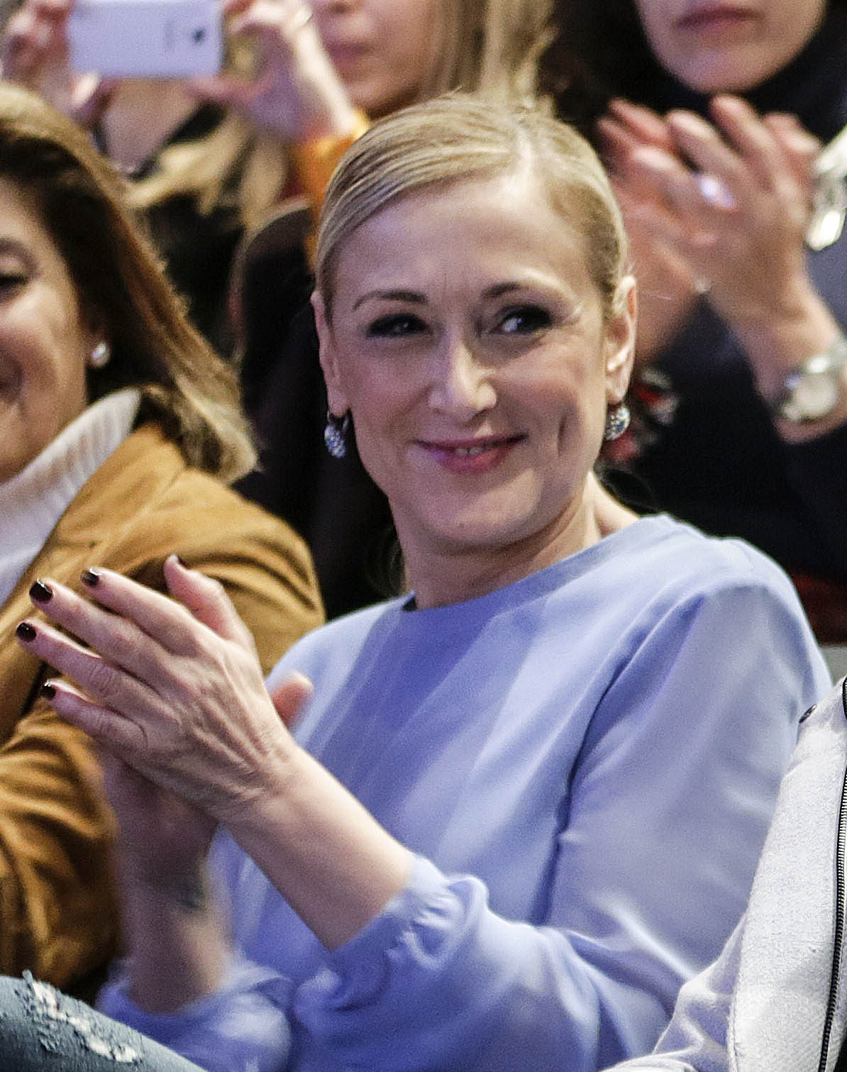 Acto presentación candidatos PP MADRID NORTE